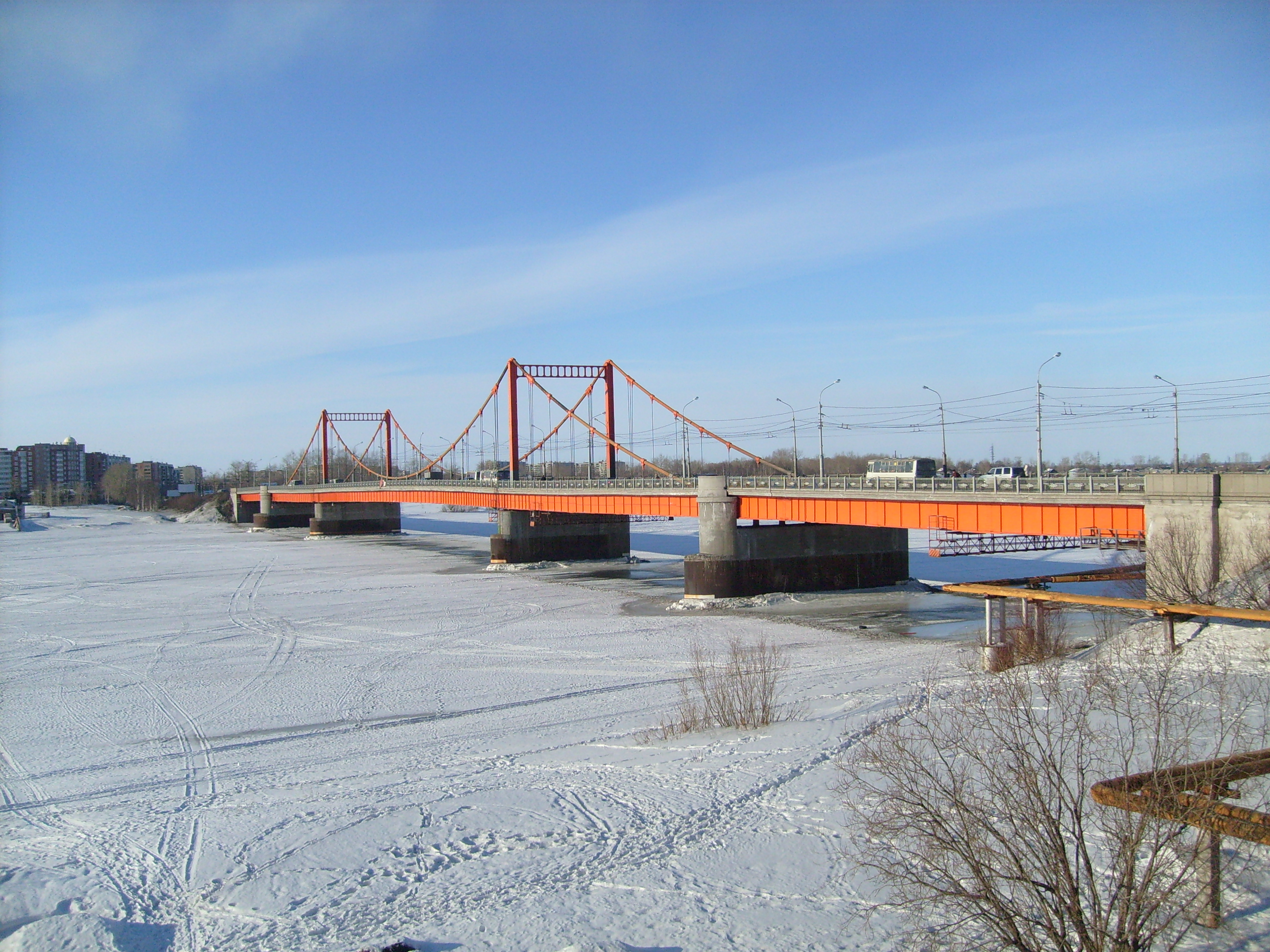 Кузнечевский мост